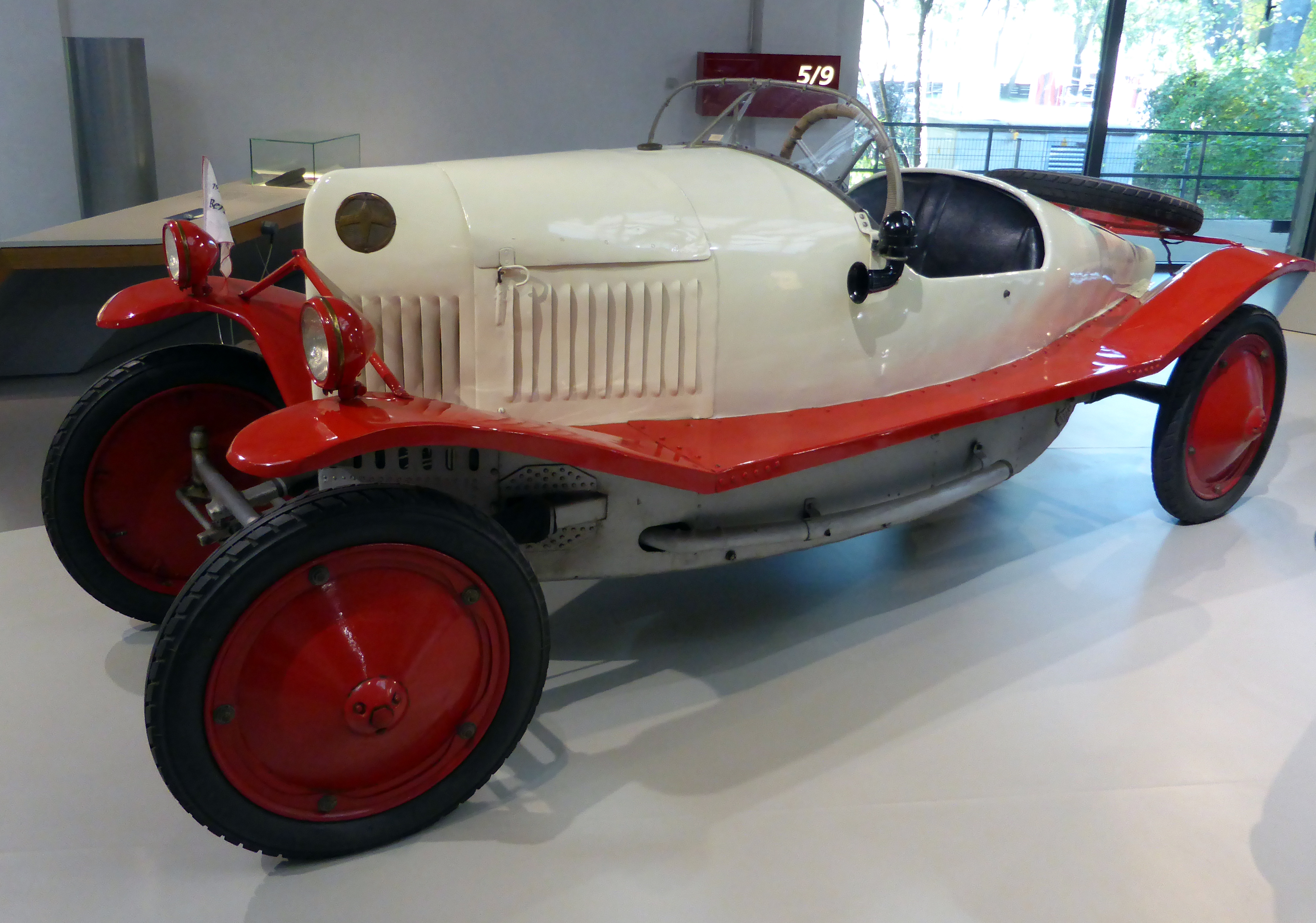 Grade-Wagen 4/16 PS, Baujahr 1922. Ausgestellt im Deutschen Technikmuseum in Berlin. Wikipedianische KulTour am 10. Oktober 2015 in der Ausstellung des Museums.